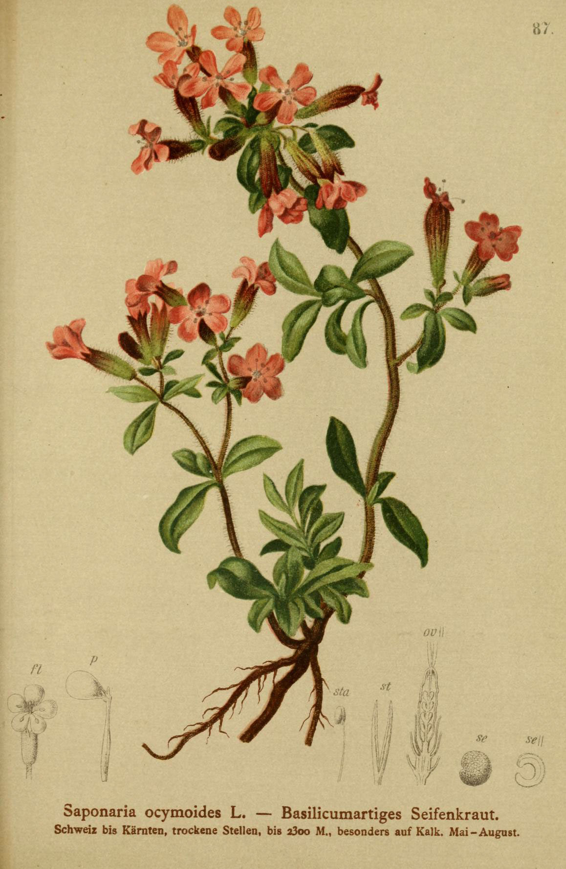 8/ Saponaria ocymoides L. — Basilicumartiges Seifenkraut. Schweiz bis Kärnten, trockene Stellen, bis aSoo M., besonders auf Kalk. Mai -Augast.